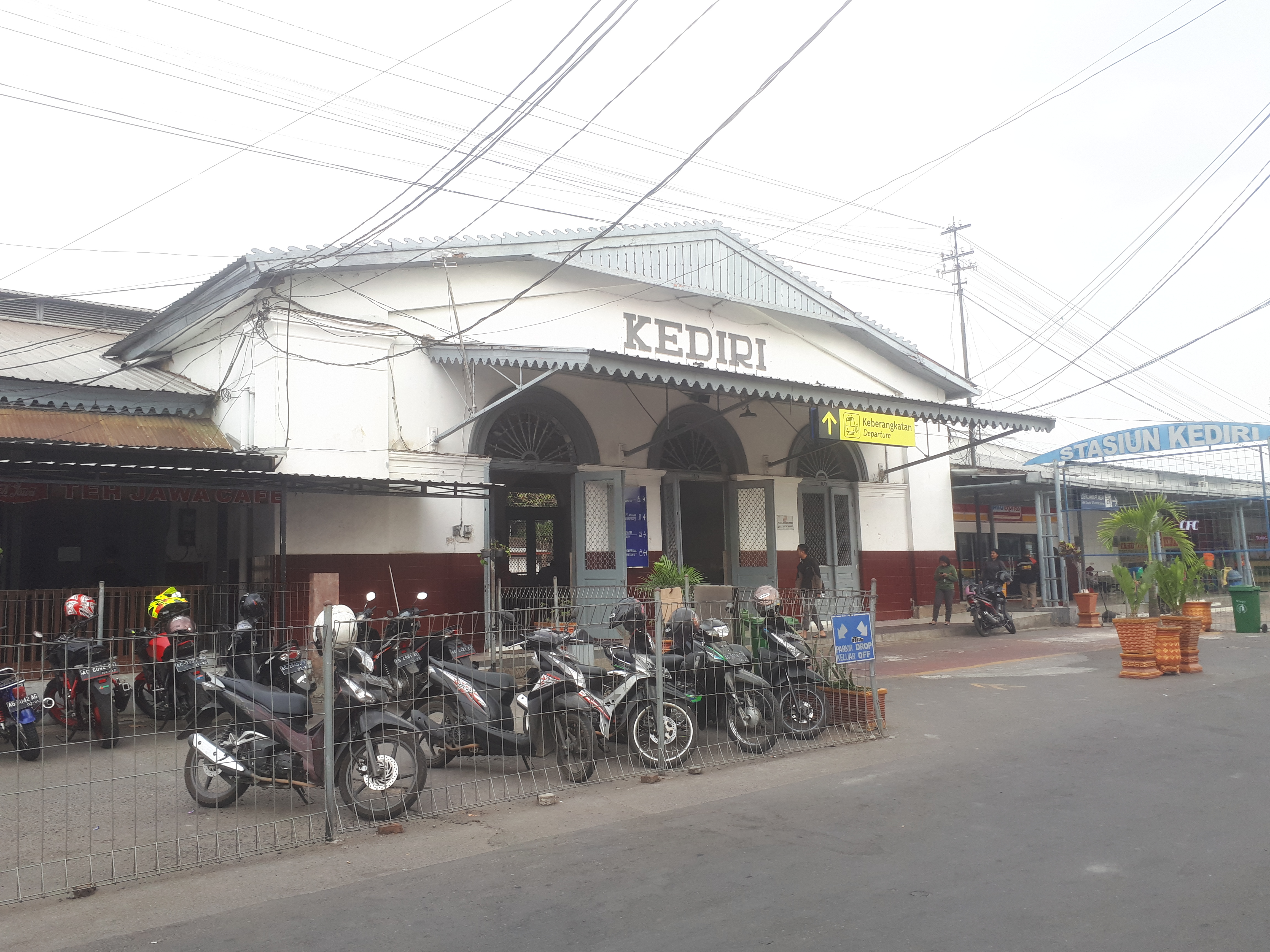 Bagian depan stasiun Kediri tahun 2019.